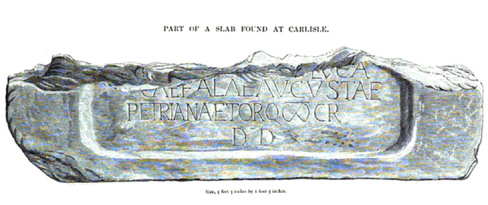 Inschriftenfragment der ala Petriana, 2. Jahrhundert n.Chr., gefunden 1860 in den Fundamenten des Carlisle Journal Office, Carlisle (GB).